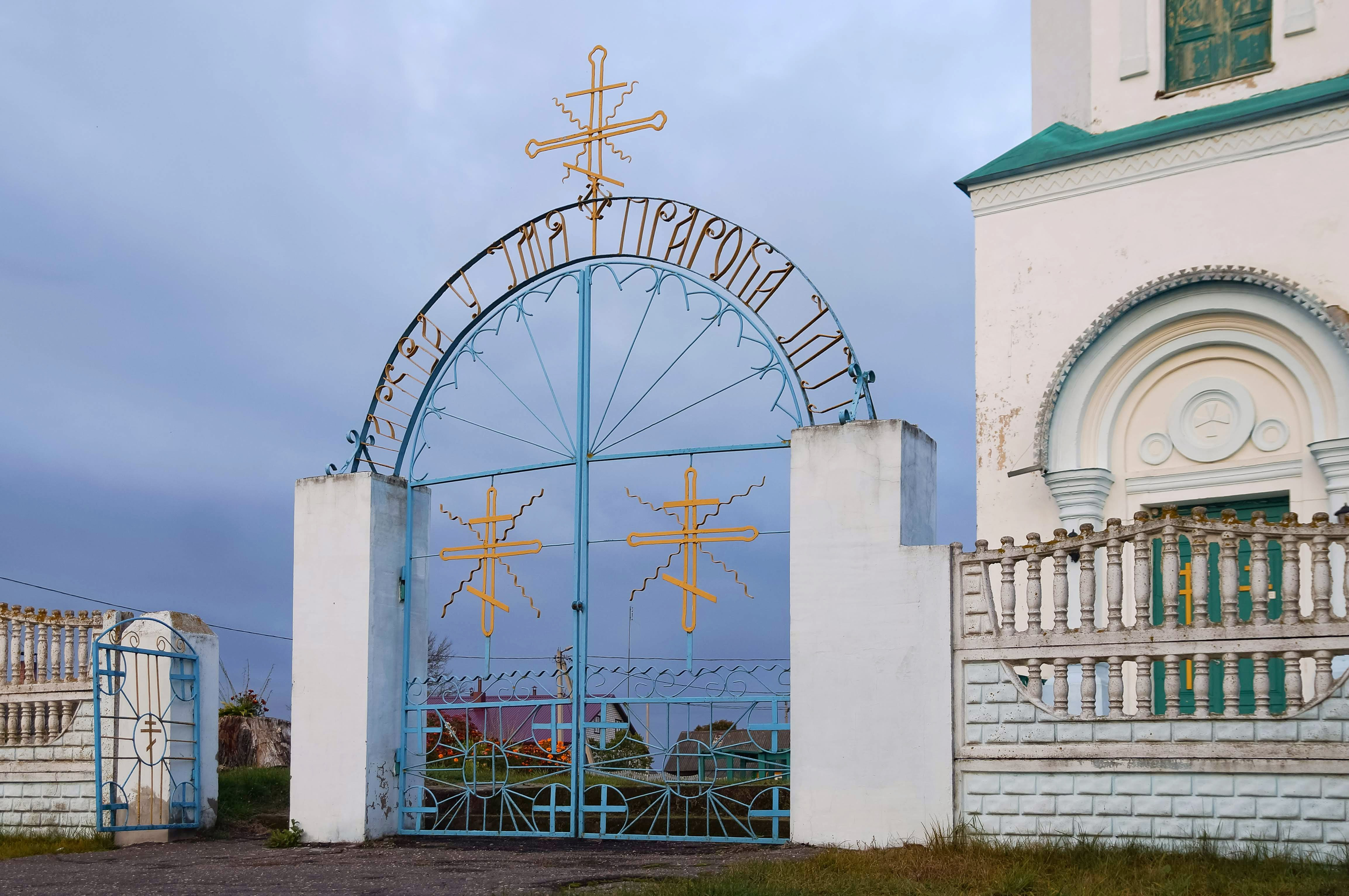 Нарач (Вілейскі раён). Свята-Ільінская царква. Брама